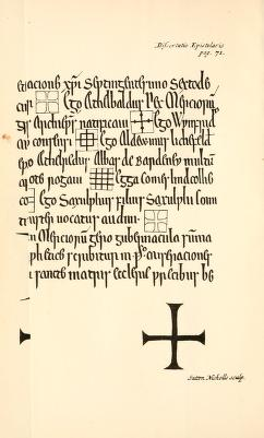 William George Searle: Ingulf and the Historia Croylandensis. Cambridge, Cambridge antiquarian Society, 1894. Frontispiz